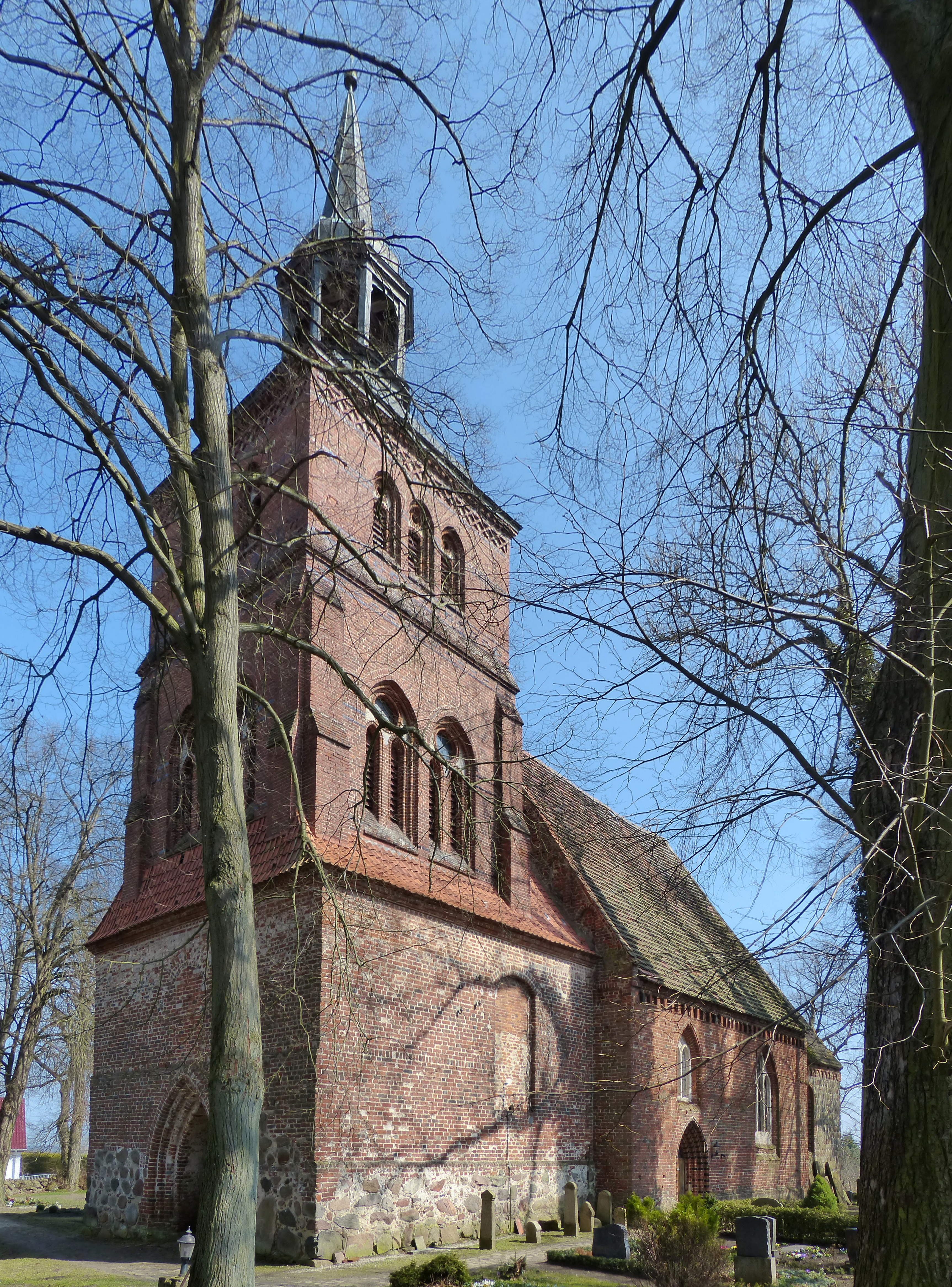 Kirche Groß Kiesow, Ansicht von Südwesten